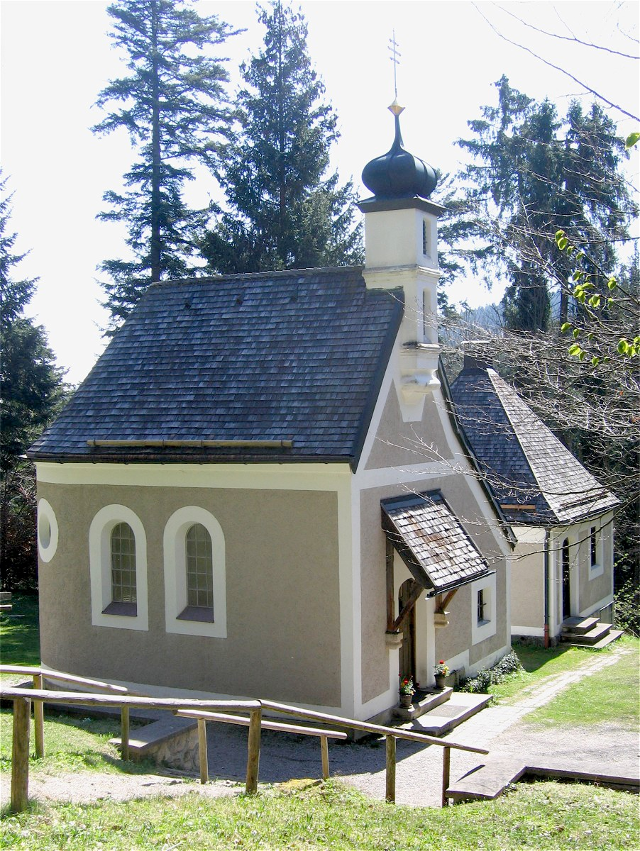 Marienwallfahrt Nüchternbrunn am Taubenberg bei Osterwarngau, Oberbayern